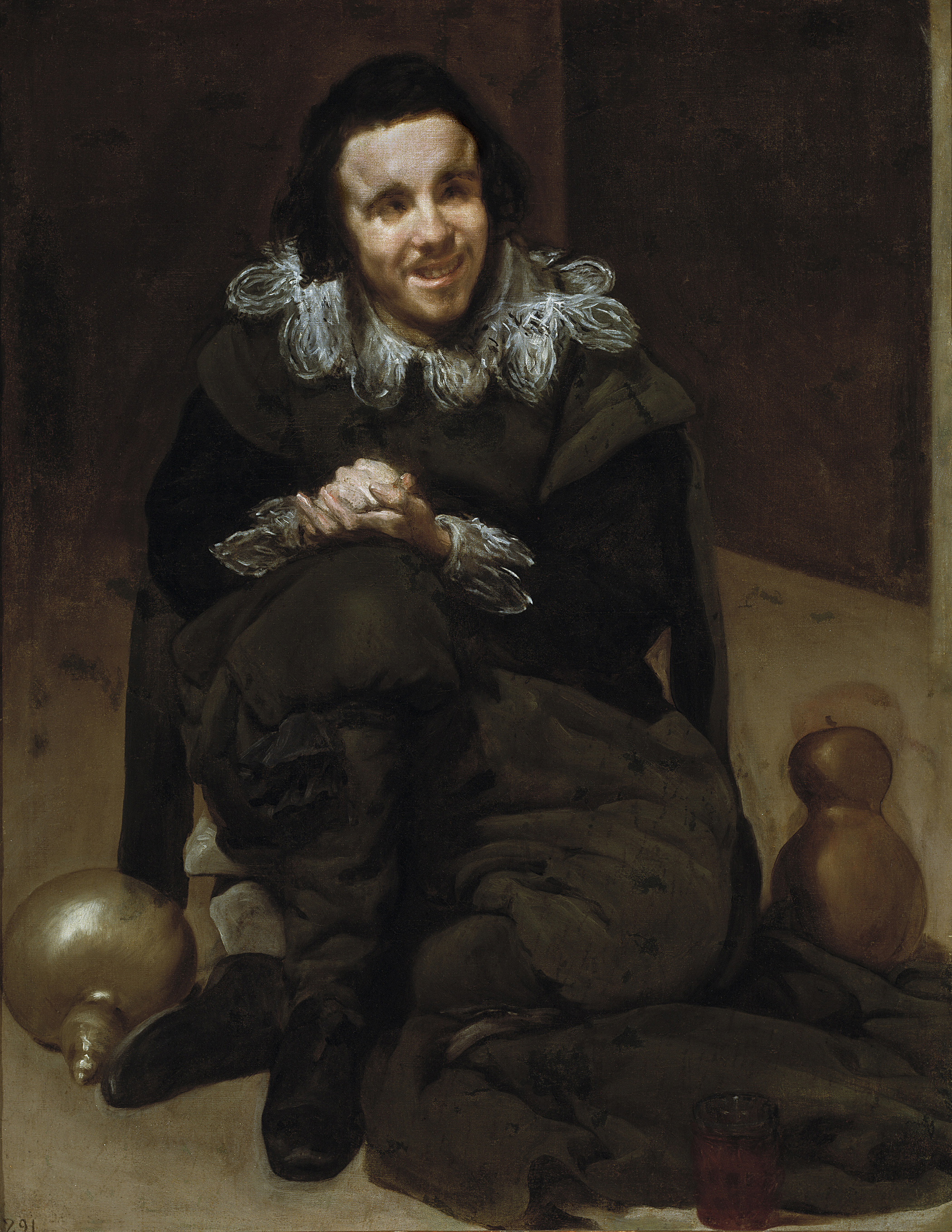 Retrato del bufón español Juan Calabazas († 1639), que sirvió al cardenal-infante Fernando de Austria y posteriormente al hermano de este último, el rey Felipe IV de España.